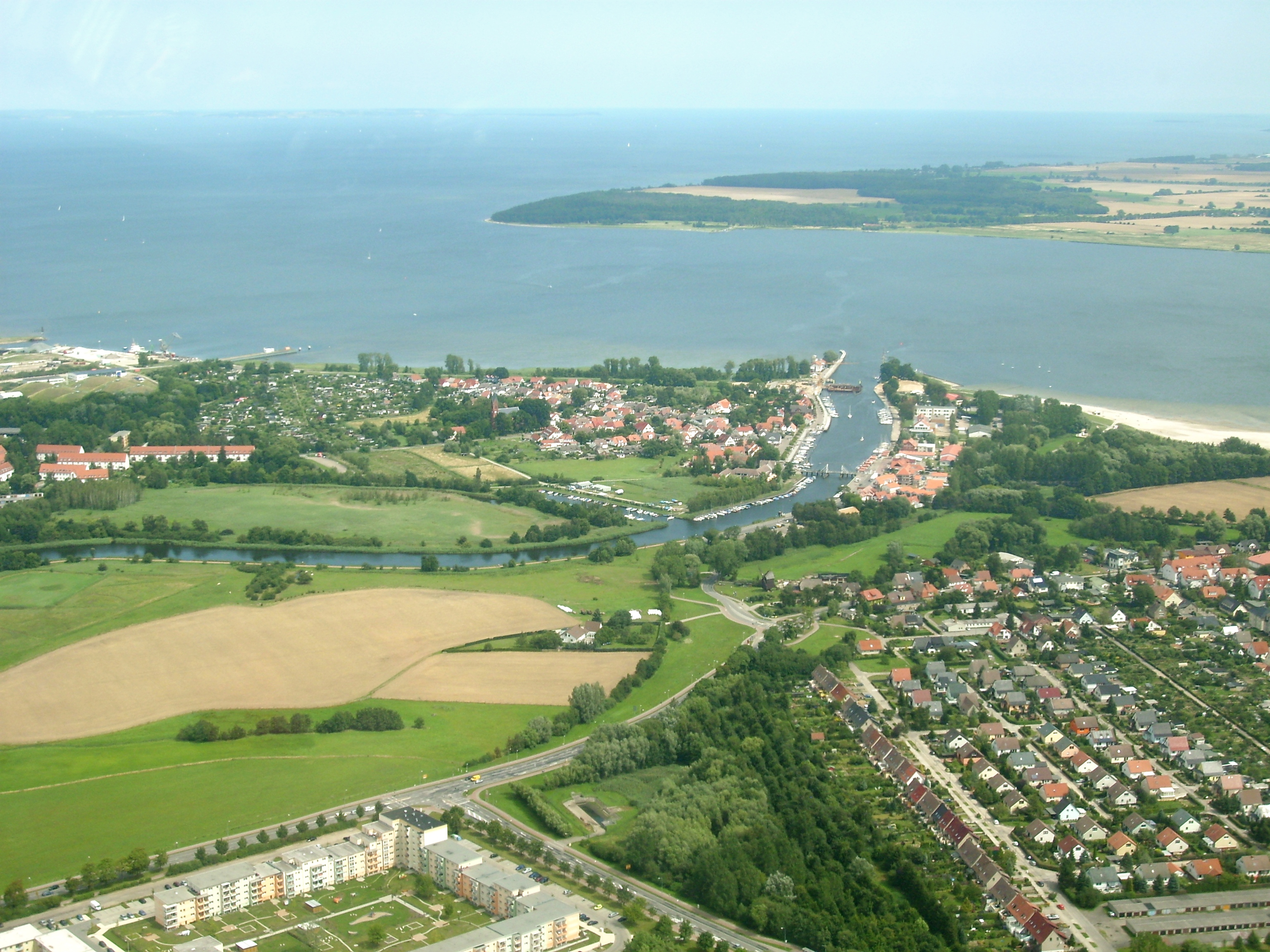 Blick nach Nordosten: Mündung des Ryck in die Dänische Wiek des Greifswalder Boddens